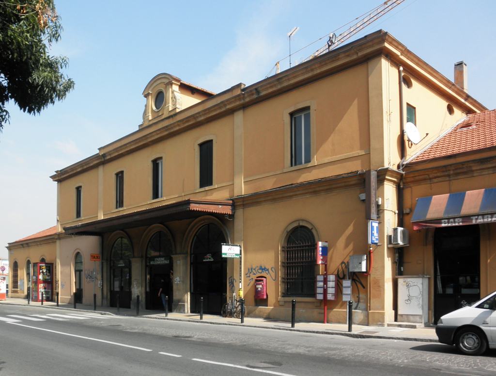 Il fabbricato viaggiatori della stazione di Bologna Zanolini (all'epoca dello scatto denominata "Bologna San Vitale").